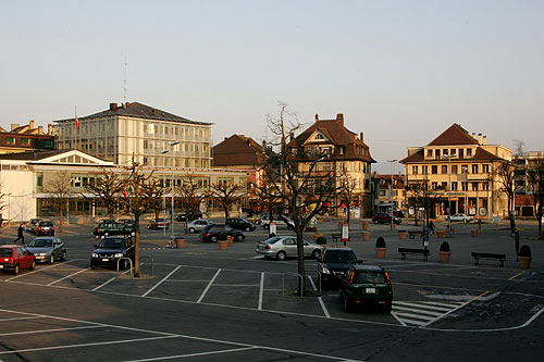 Payerne: Hôtel de Ville (Place Général Guisan)